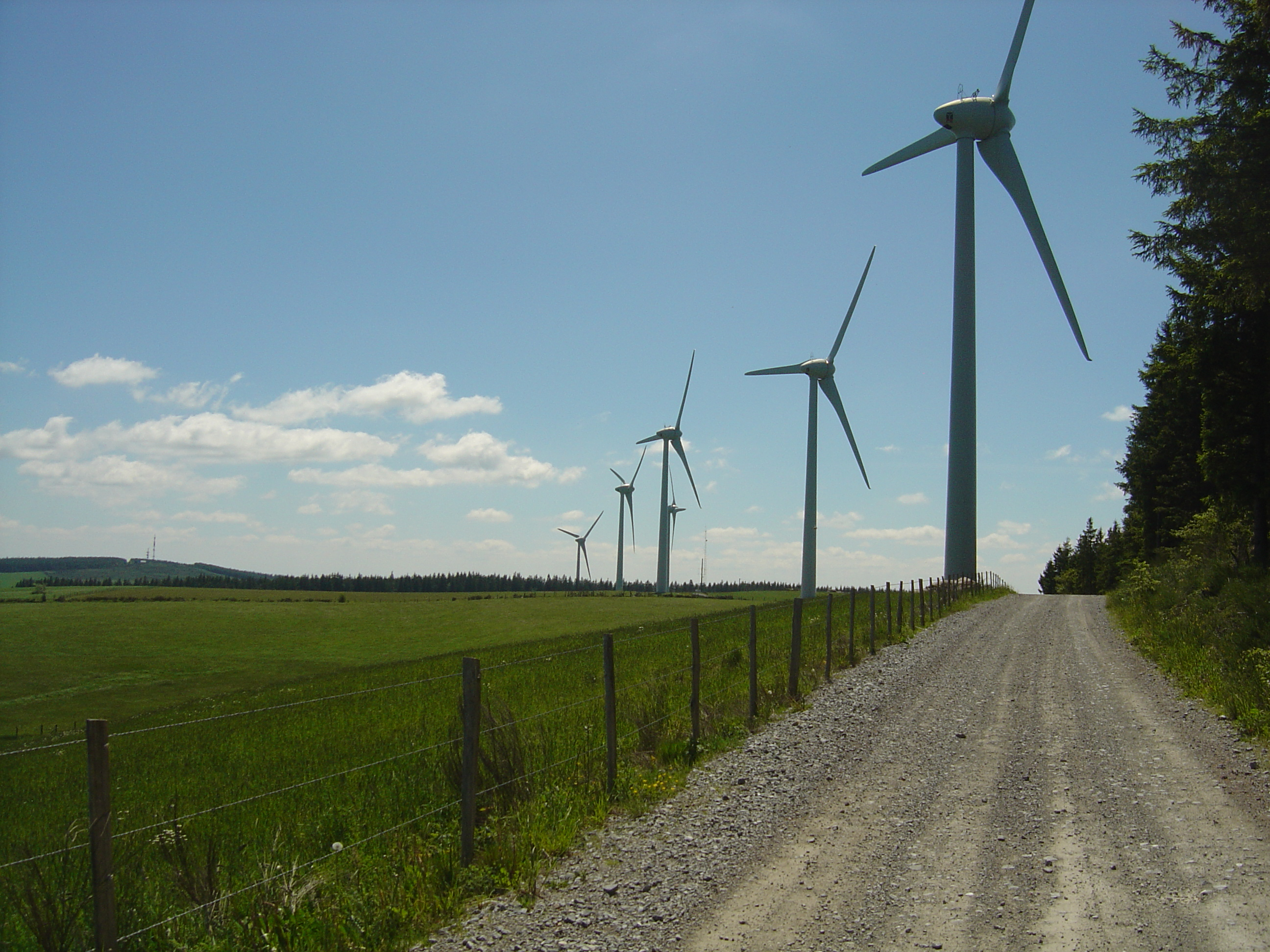 éoliennes des Monts du Lévézou. Photo prise au-dessus du col de Poulzinières entre Estalane et Bouloc.